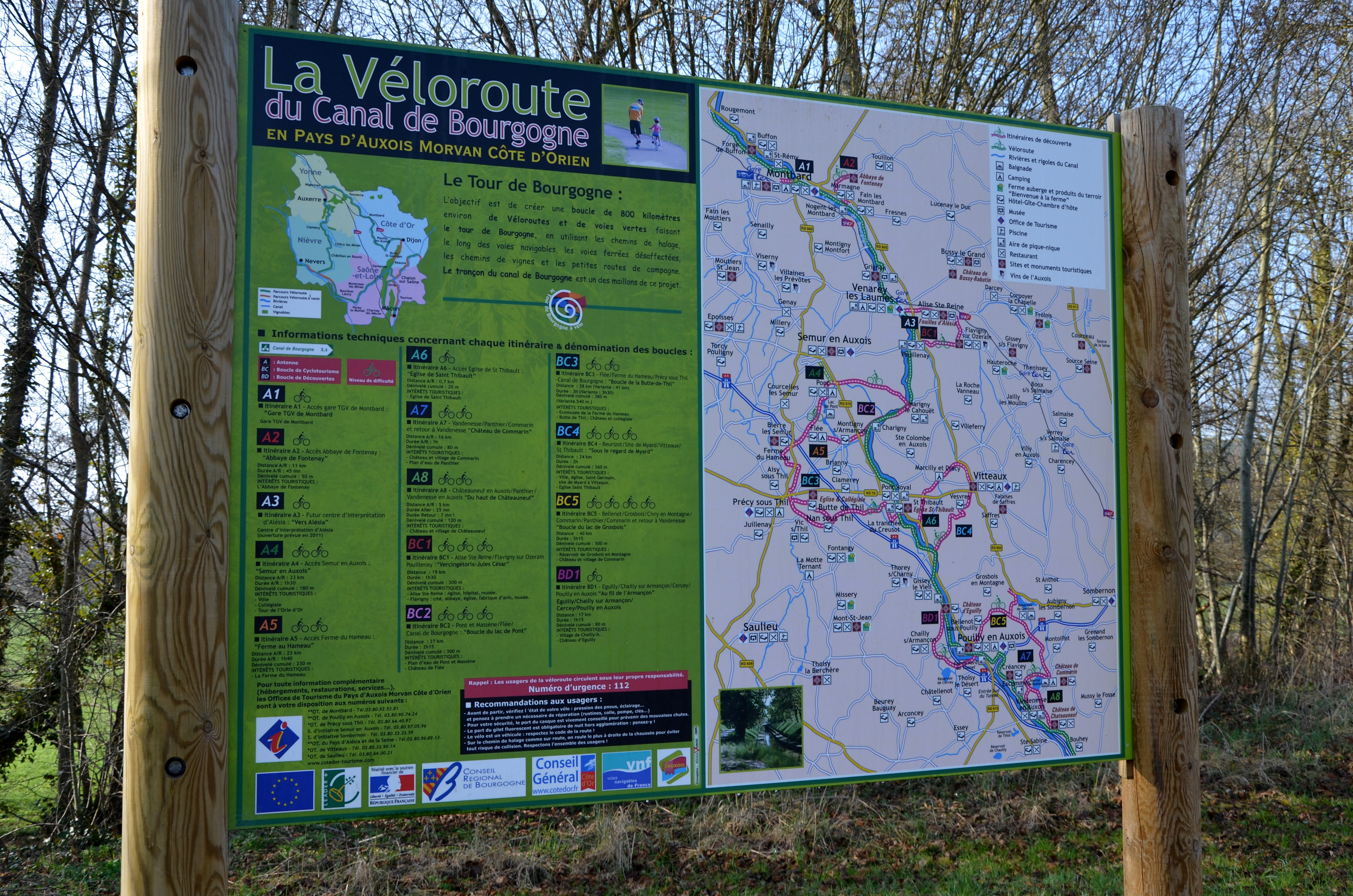 Panneau sur la veloroute du canal de Bourgogne , France